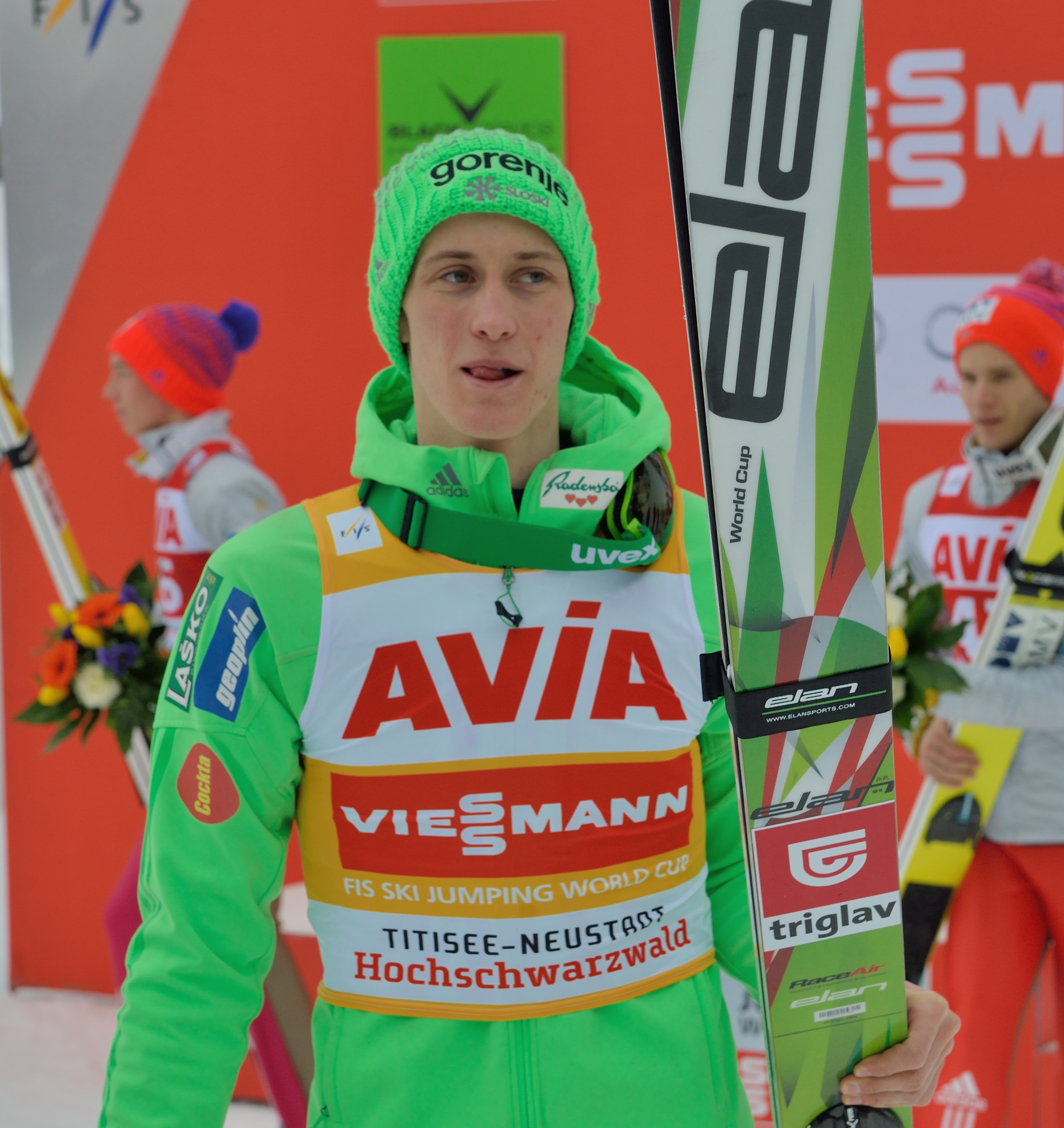 FIS Ski Weltcup Titisee-Neustadt 2016: Peter Prevc